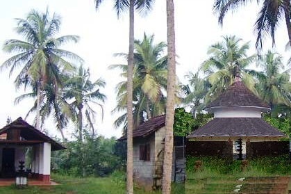 മണിയൂർ മഹാദേവക്ഷേത്രം